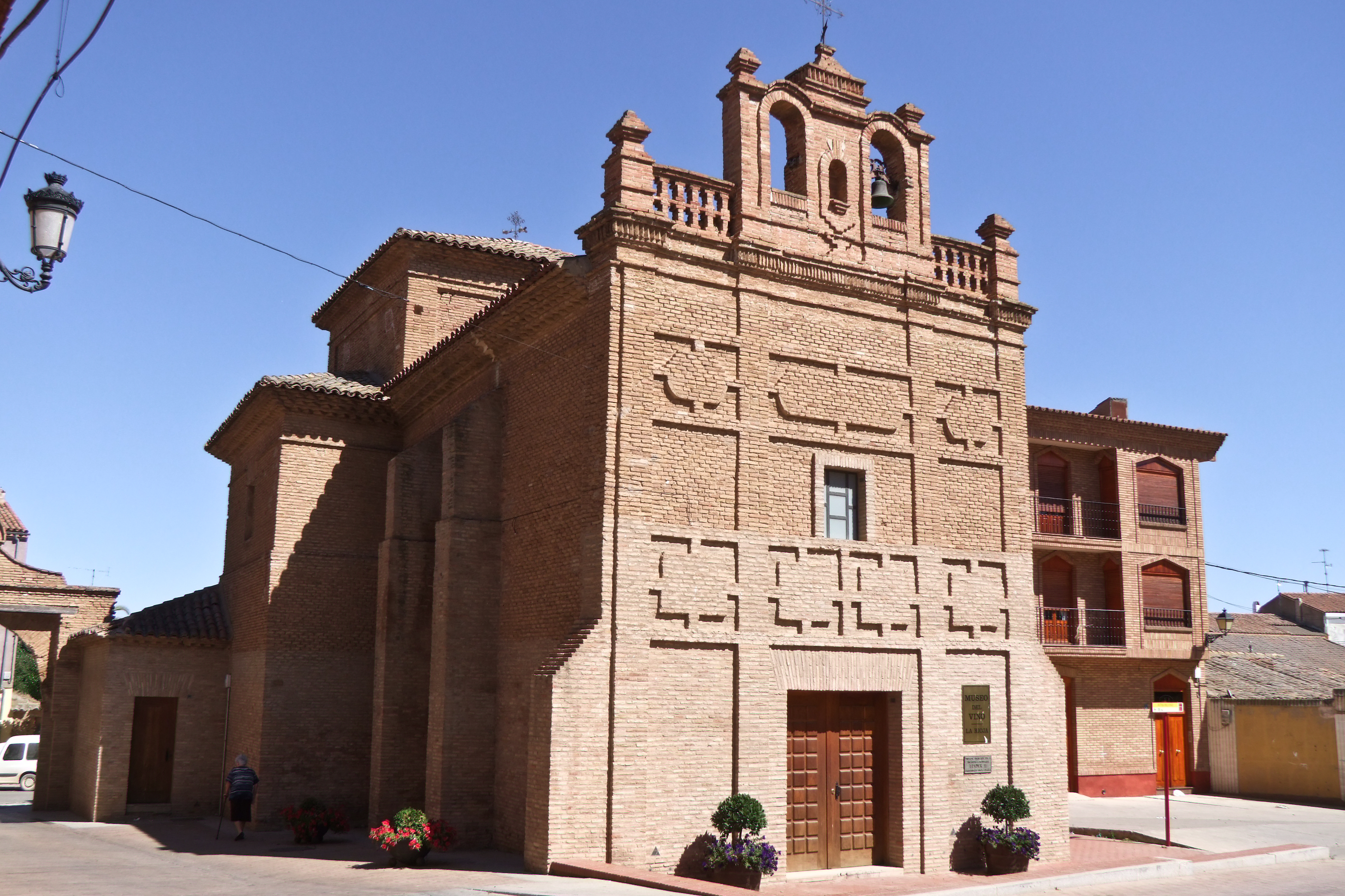 Ermita del Portal en la localidad de Aldeanueva de Ebro, La Rioja - España